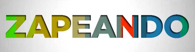 logo de zapeando